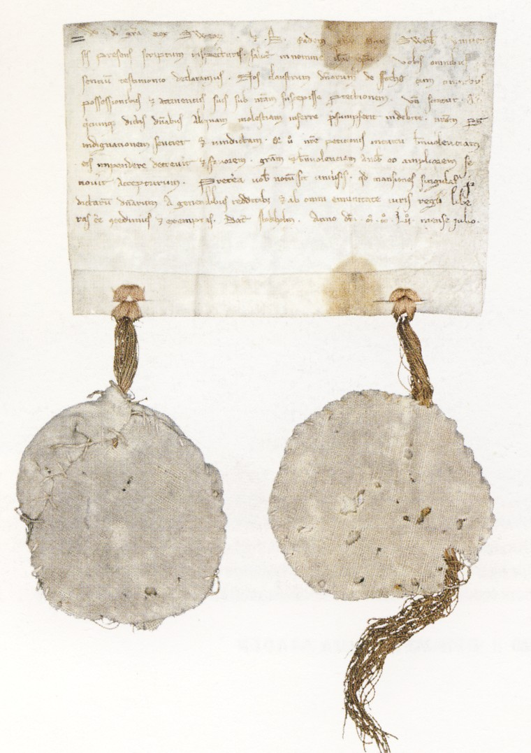 Skyddsbrev för Fogdö kloster utfärdat av Birger jarl i Stockholm i juli 1252